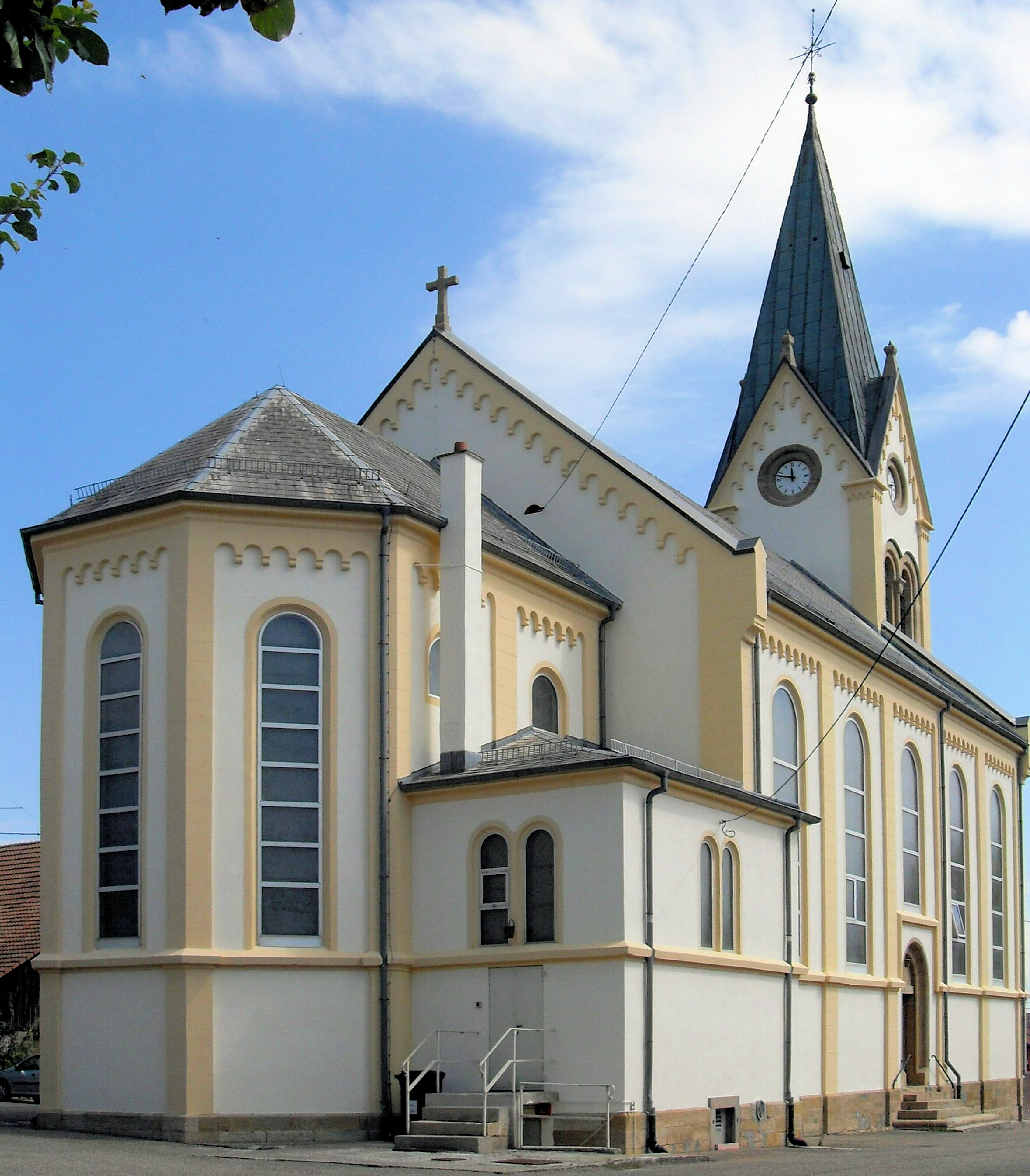 L'église Saint-Valentin d'Attenschwiller